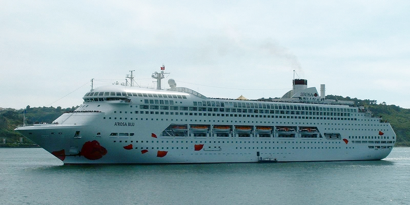 Kreuzfahrtschiff A'Rosa Blu, 2004 in Lissabon